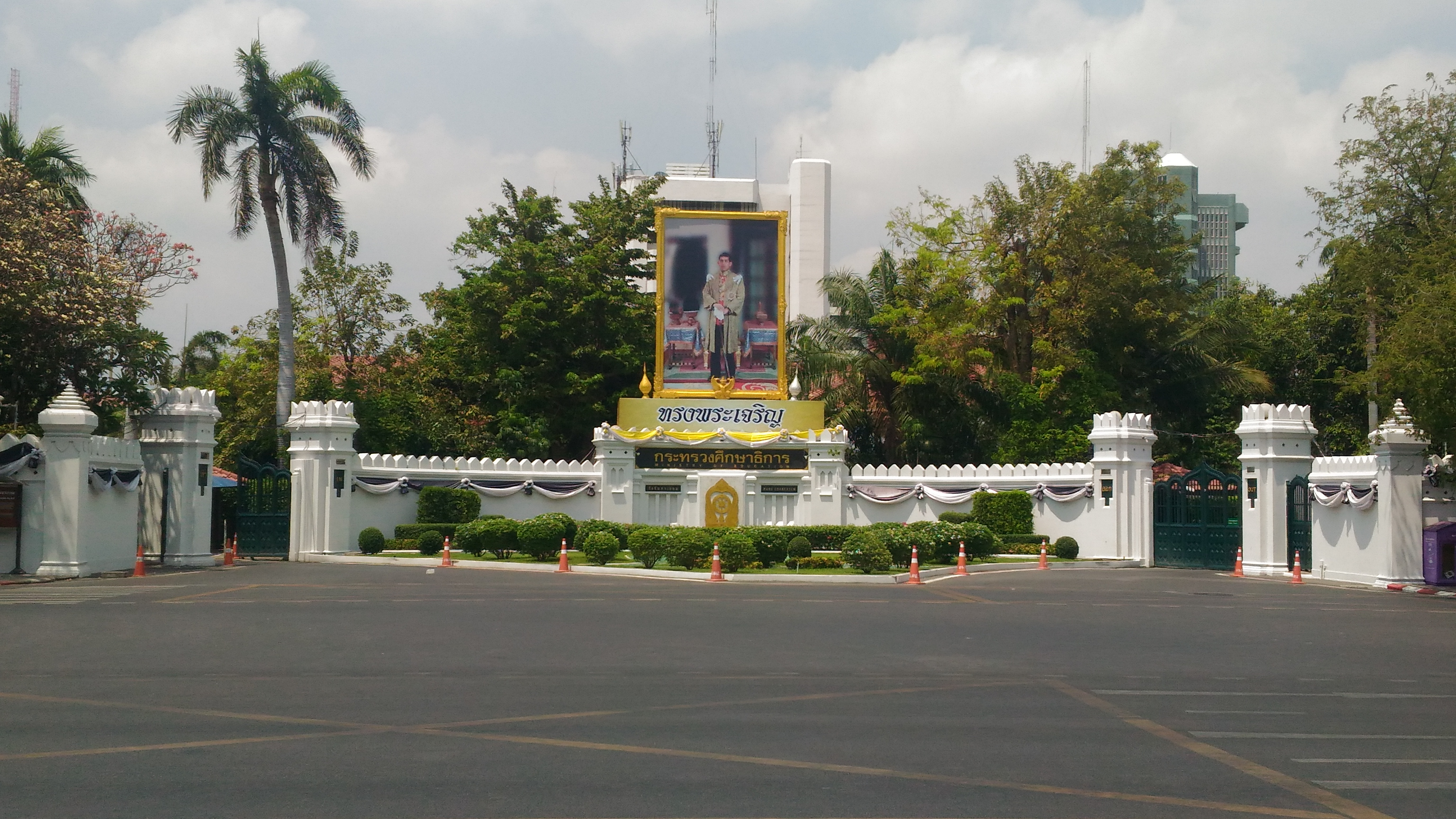 การตั้งแต่งพระบรมฉายาลักษณ์ของสมเด็จพระเจ้าอยู่หัวมหาวชิราลงกรณ์ บดินทรเทพวรางกูร ที่หน้ากระทรวงศึกษาธิการ วังจันทรเกษม ถนนราชดำเนิน กรุงเทพ